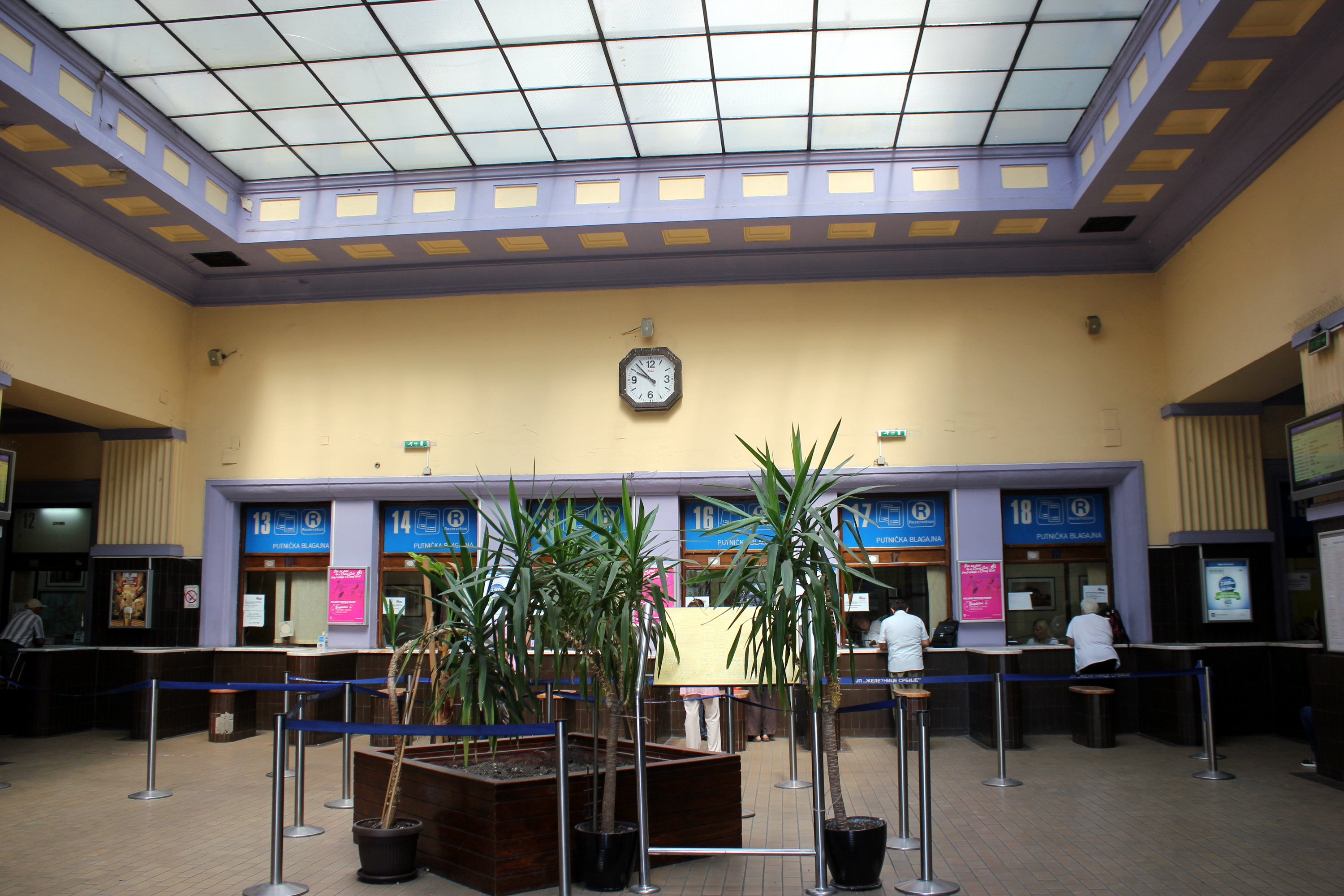 Schalterhalle auf dem Hauptbahnhof Belgrad, Serbien.